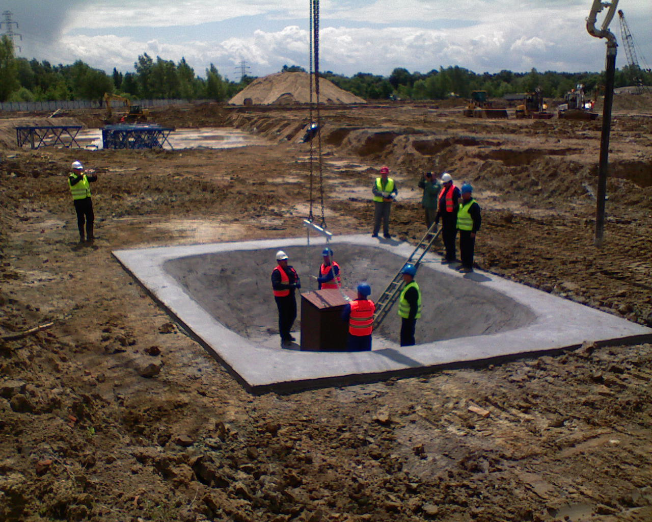 Wmurowanie kamienia węgielnego pod stadion miejski Wrocławia na Maślicach